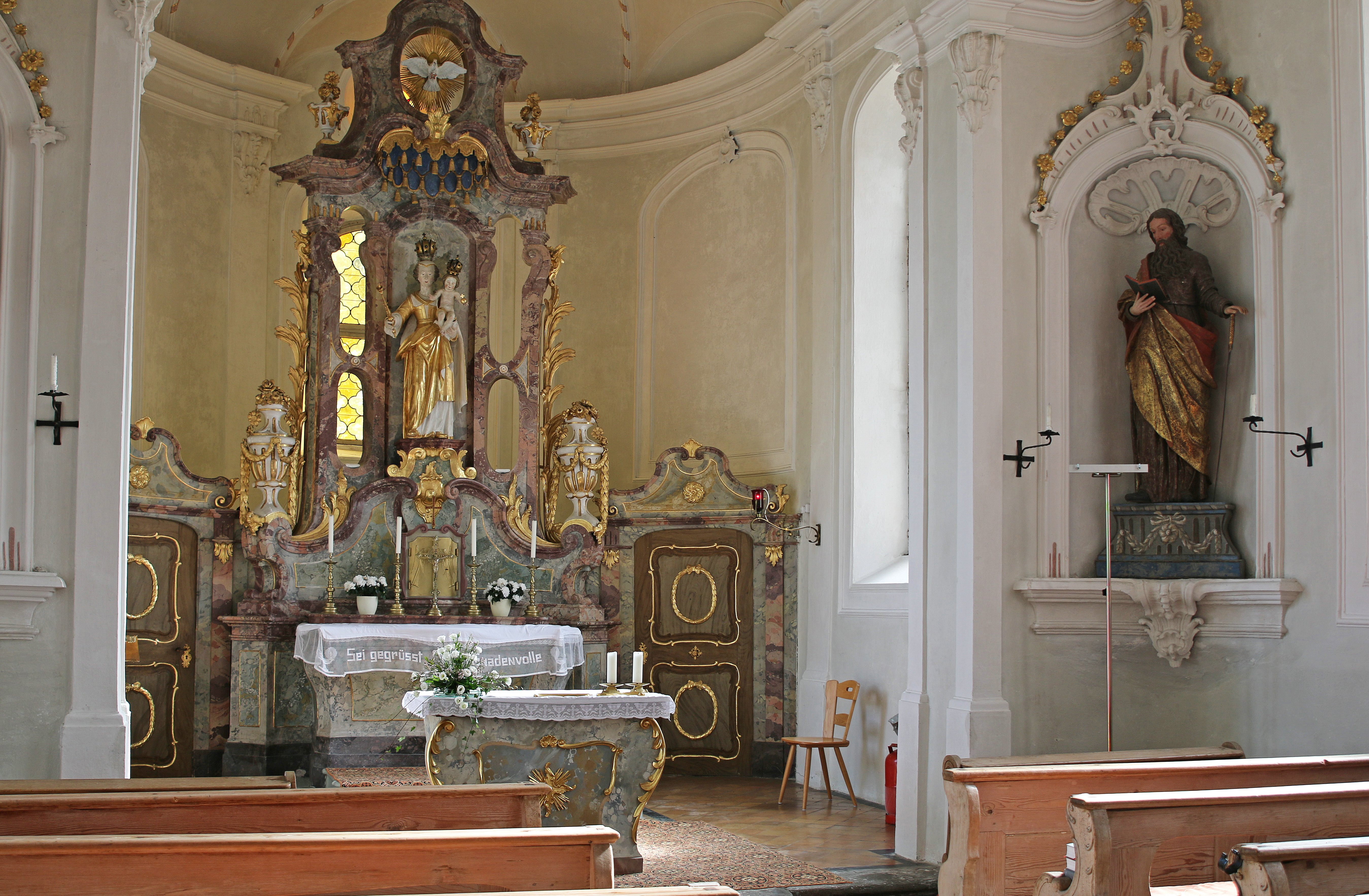 Altarraum der Kapelle Mariä Heimsuchung auf dem Mariaberg (Kempten)